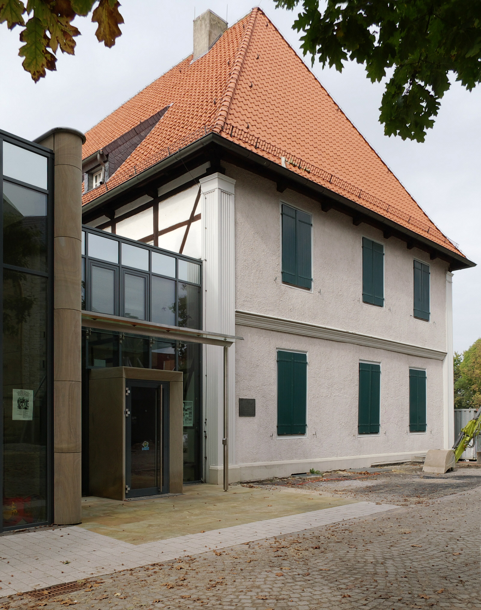 Altes Amtshaus in Werne a.d. Lippe Altes Amtshaus, ursprünglich zum Wohnhaus umgebaut ca. 1691 vom bischöflichen Amtsrentenmeister von Bruchhausen ca. 1800 wurde das Fachwerkhaus verputzt im 19. Jh. Privatbesitz ("Homann'sches Haus") 1962 vom Realschullehrer Karl Pollender als Heimatmuseum umgestaltet 1977-1980 Restaurierung, seitdem Stadtmuseum und historisches Archiv